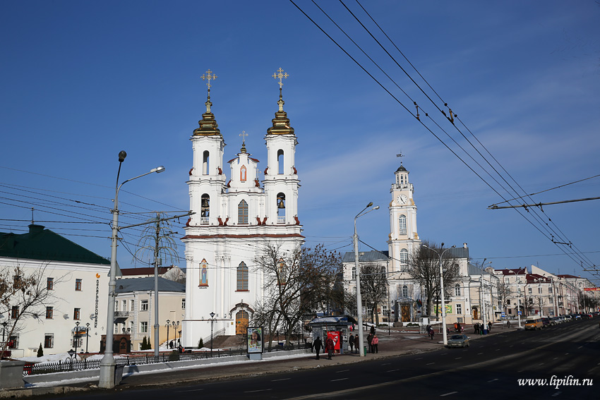 Віцебск.